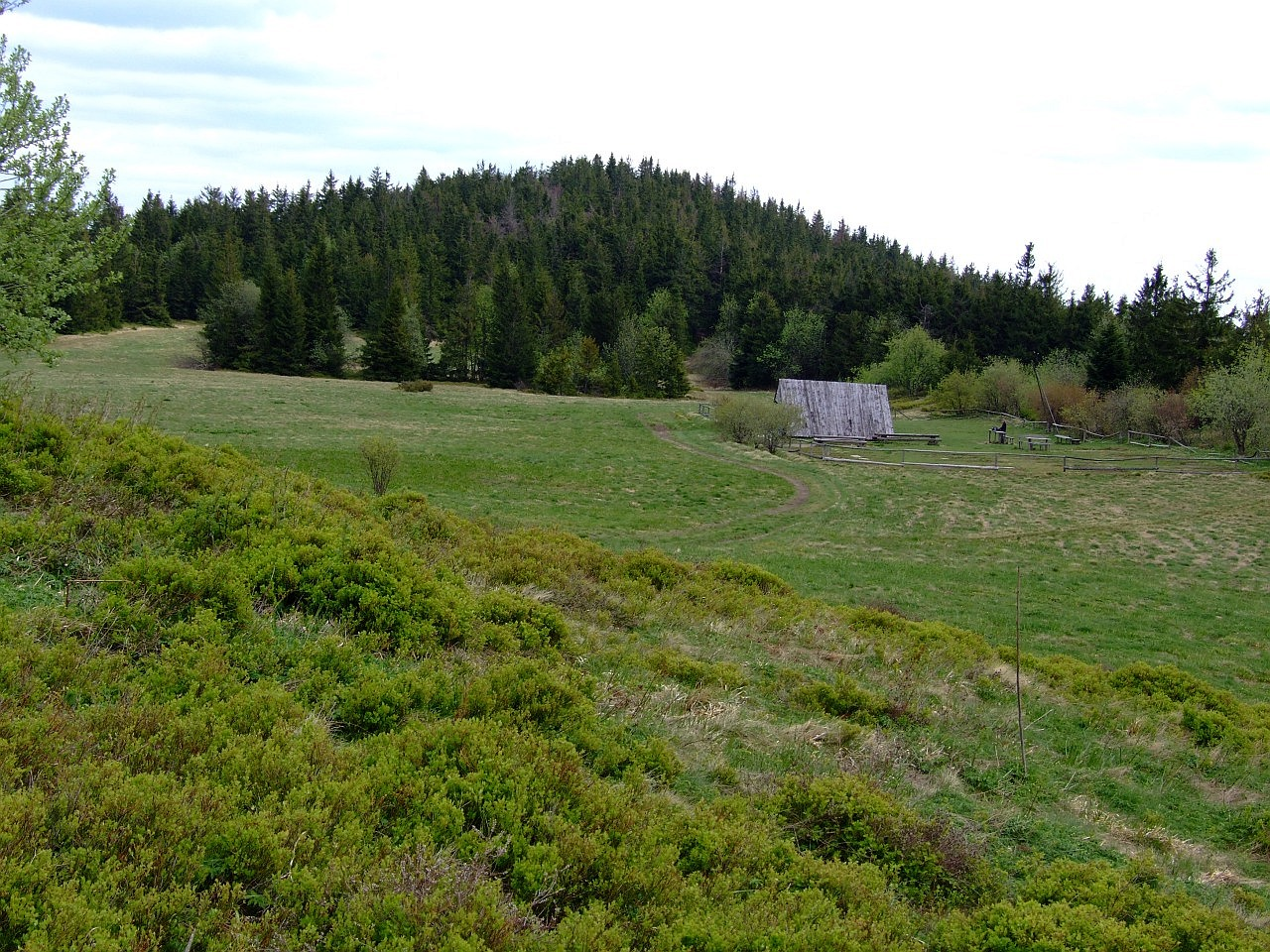 Polana Wierch Lubania w Gorcach i studencka baza namiotowa (przed sezonem)